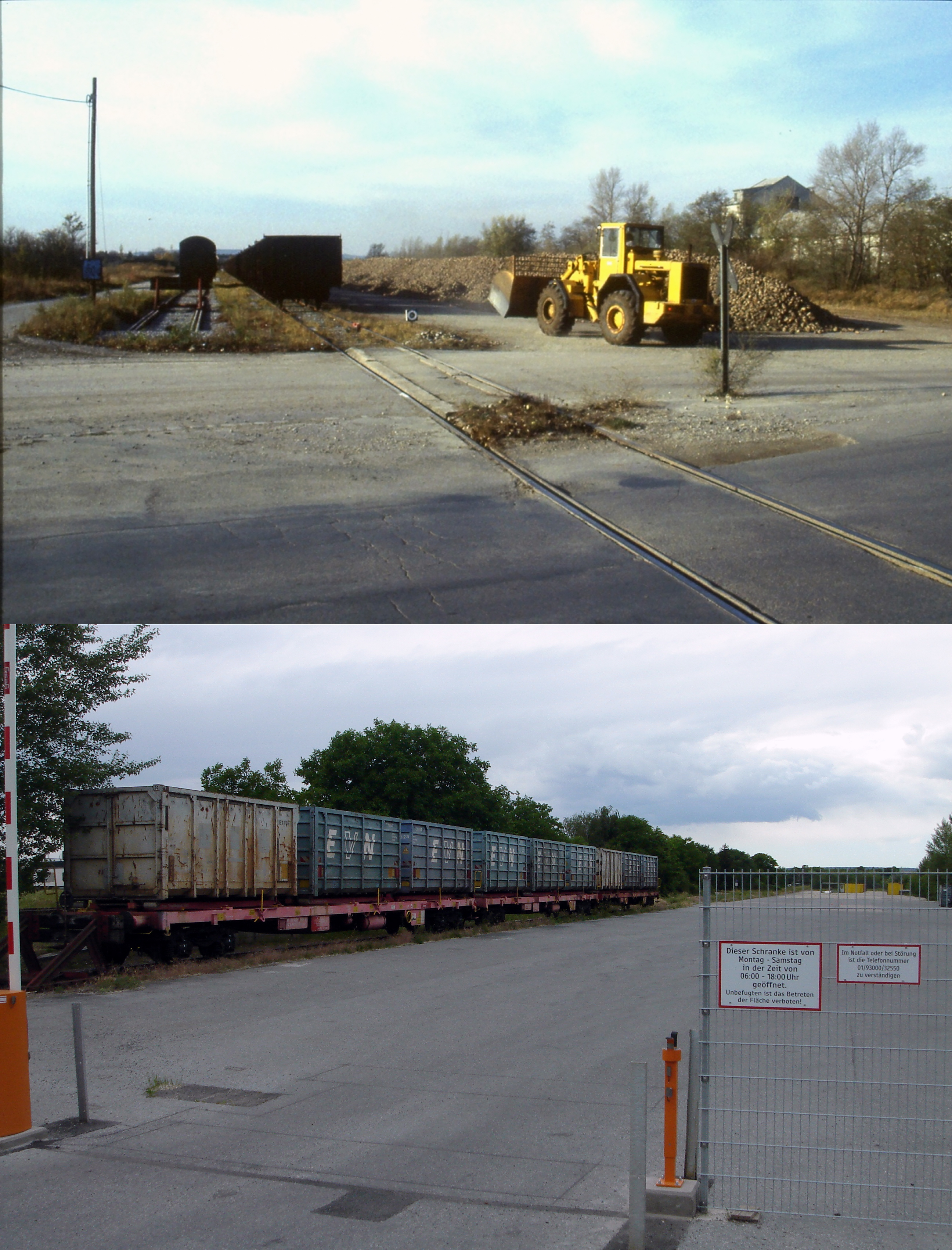 Wien, Breitenlee, ehemaliger Verschiebebahnhof, Oleandergasse (oben: 1985, unten: 2017)